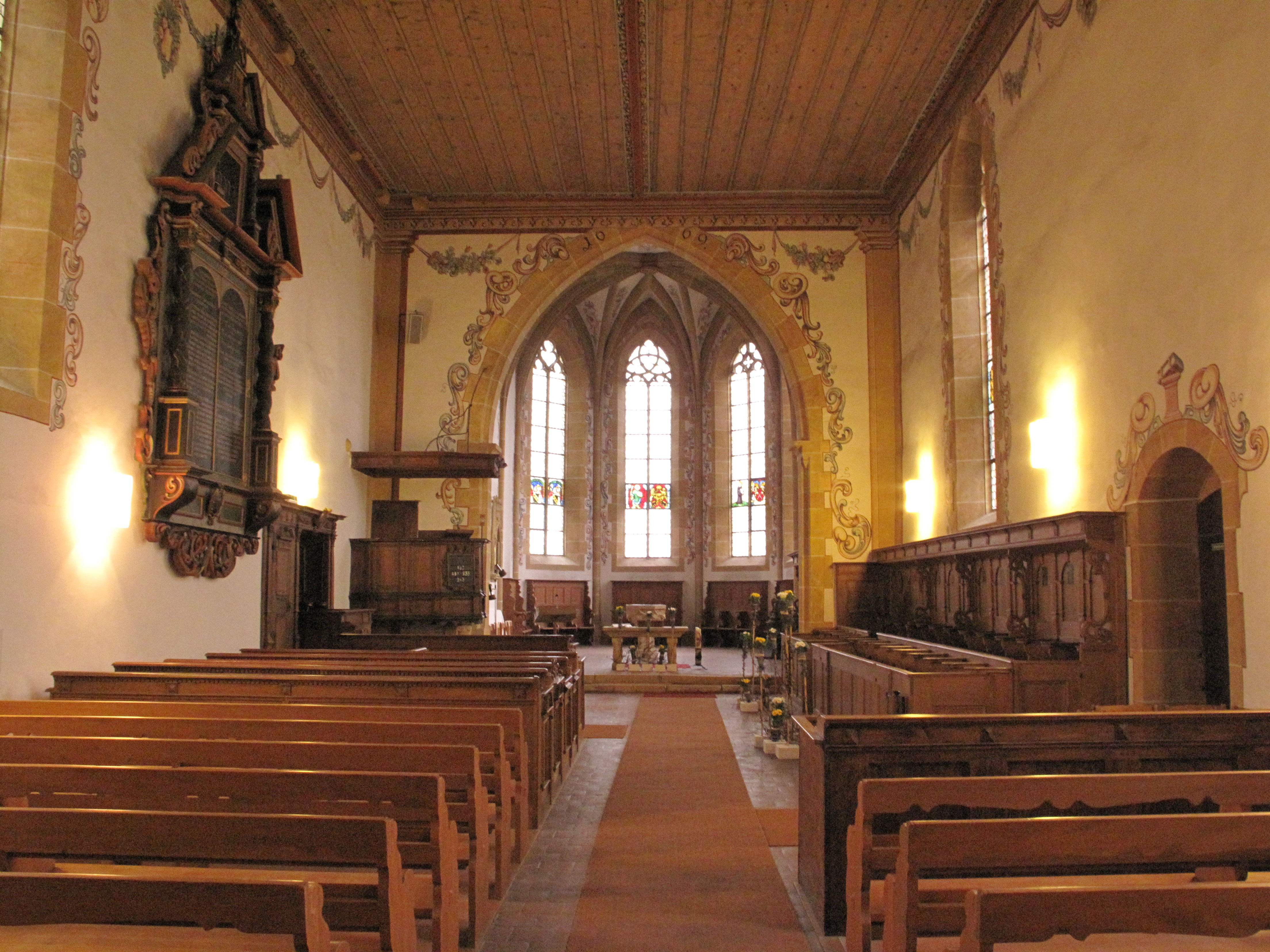 Kirche Ligerz, Innenraum.